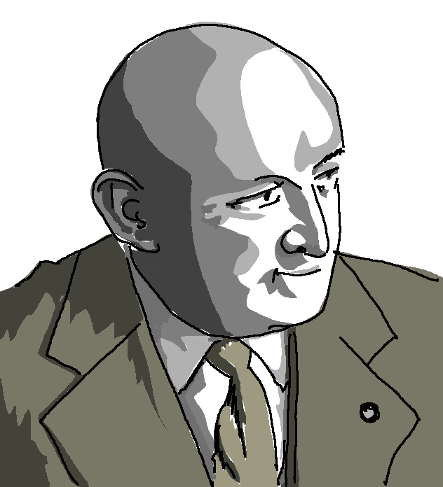 Retrato de Corradino d'Ascanio